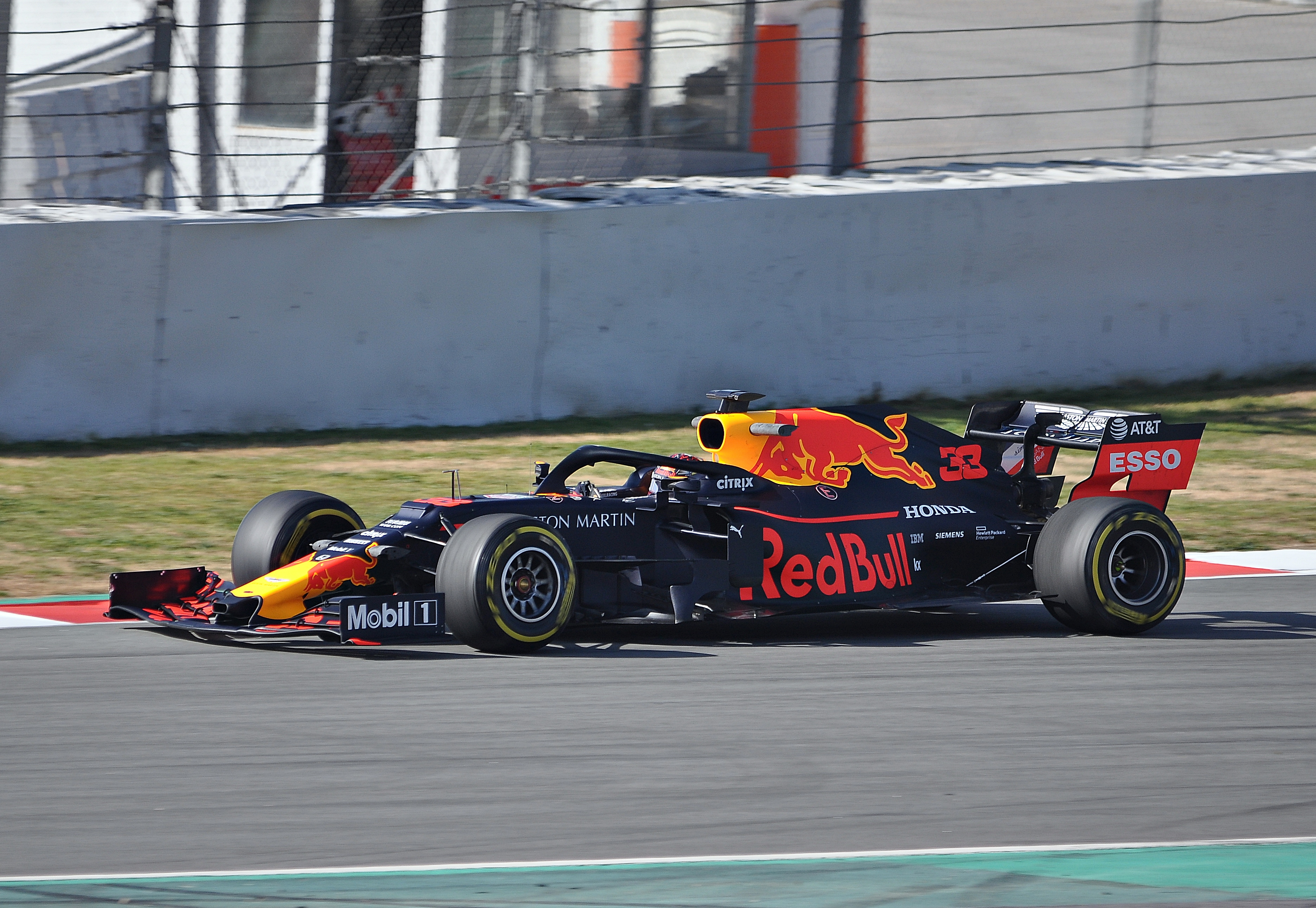 Test Days-Circuito de Catalunya